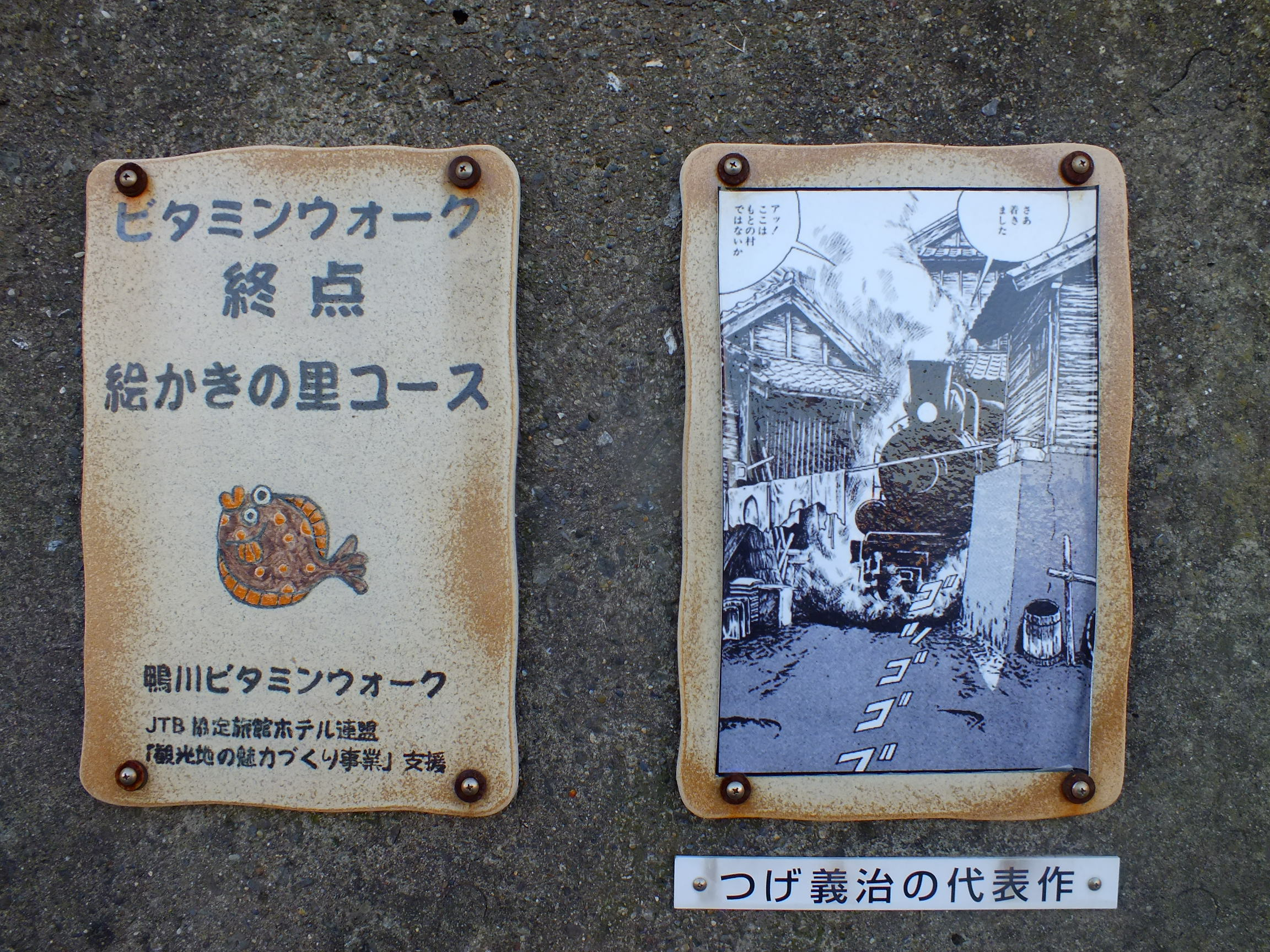 Vitaminwalk-Futomi-Yoshiharu Tsuge ビタミンウォーク終点 つげ義春